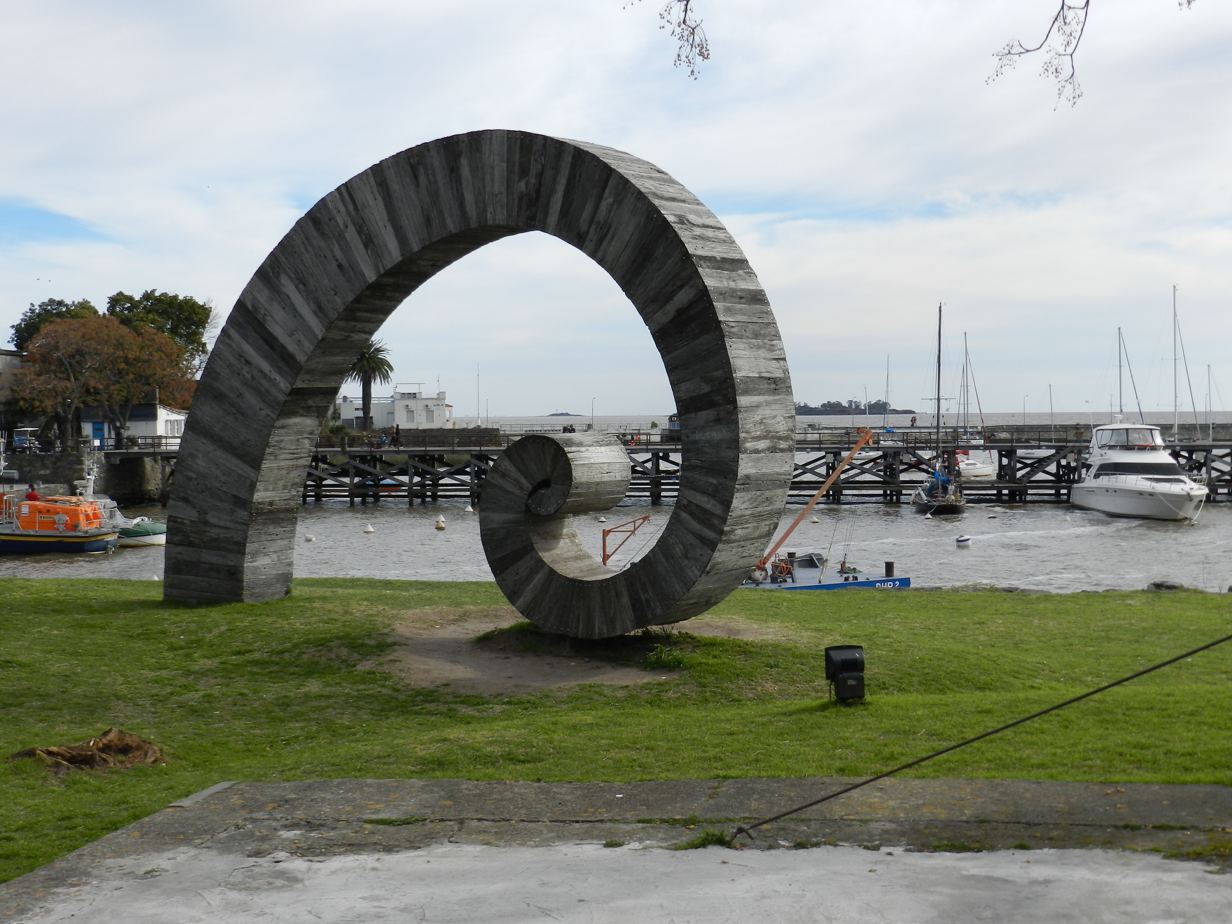 Colônia del Sacramento, Uruguai